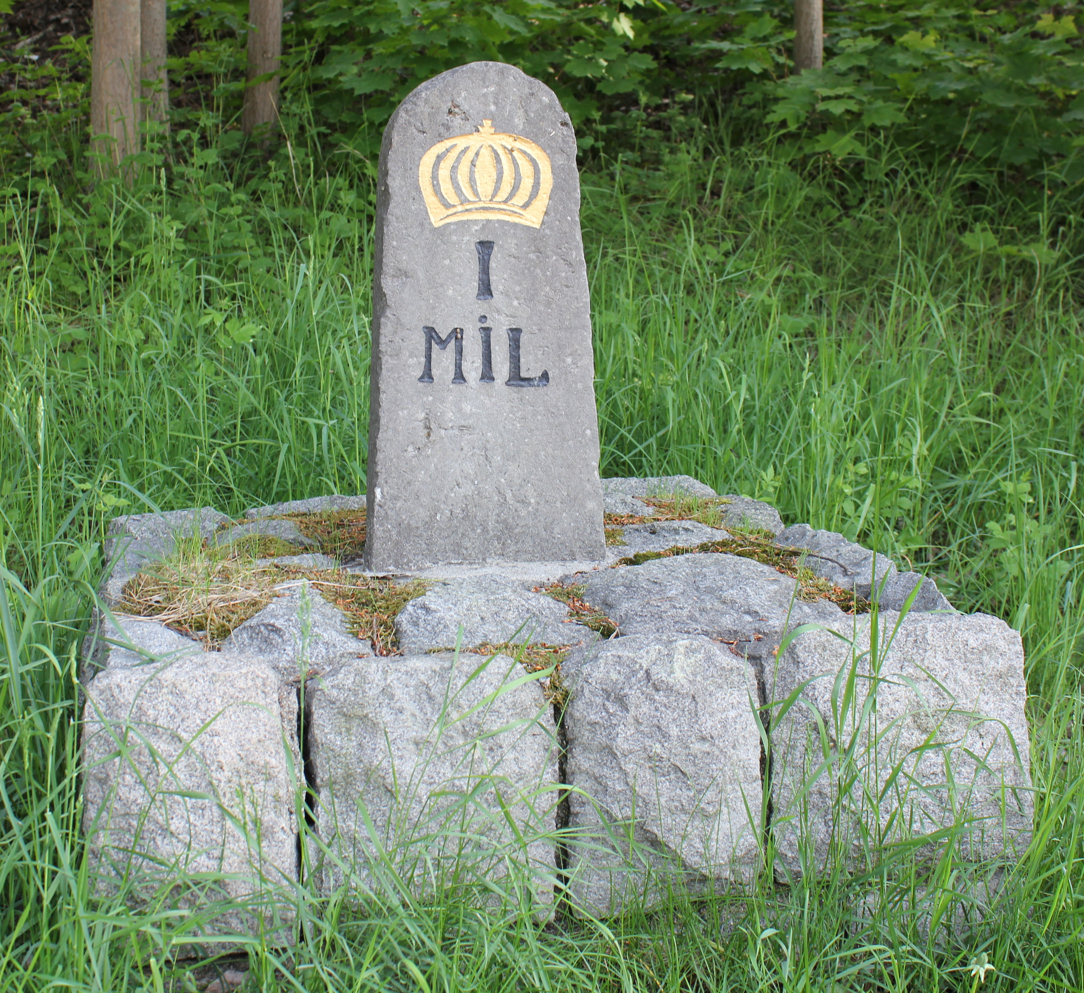 Milsten i Bromma, nära Nockebybron mot Drottningholm. Den nya kungsvägen, som invigdes den 19 augusti 1787, och som byggdes av Gustav III gick från Stortorget i Stockholm till Drottningholms slott, den "innehåller några hundra Steg öfver en Mil". Milstenen vid Nockebybron sattes upp först 1859. Referens: Brommaboken 1987, sidan 17. Arkitekt till de tre broarna, Tranebergsbron, Nockebybron och Drottningholmsbron, var Carl Fredrik Adelcrantz.